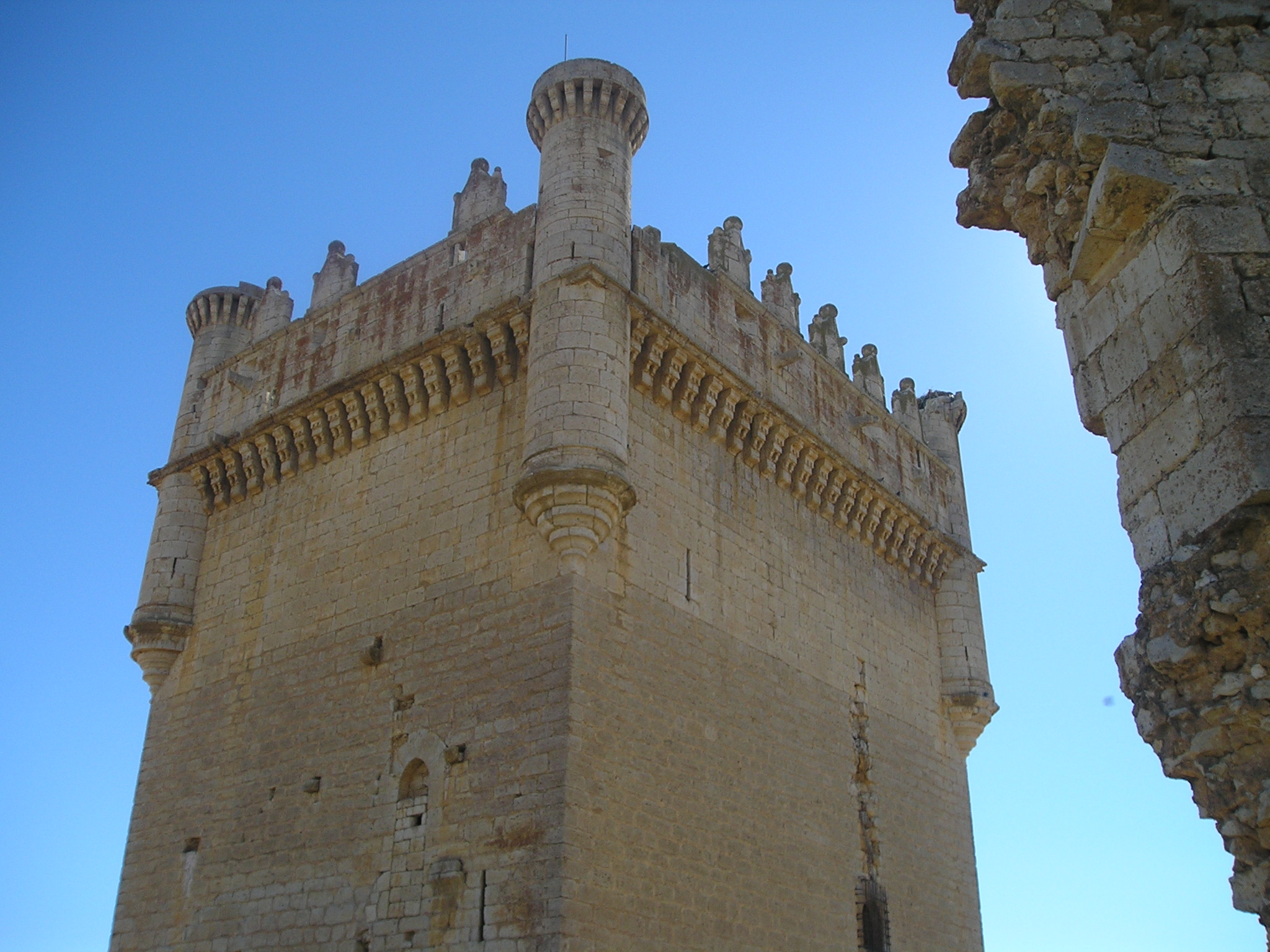 Detalle de la Torre del Homenaje del Castillo de Belmonte de Campos (Palencia, España)